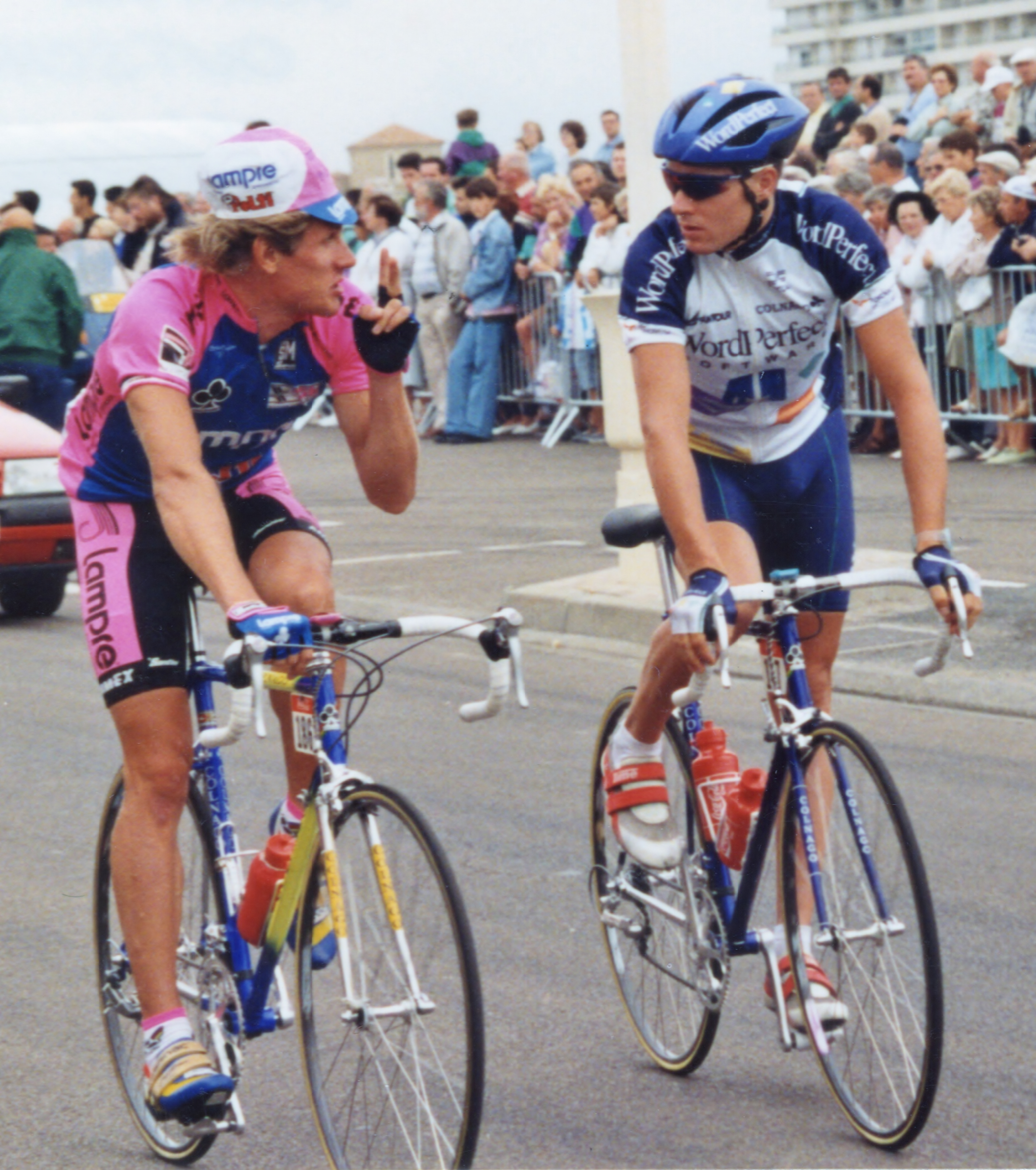 Sergueï Outschakov et Dieter Runkel lors du Tour de France 1993